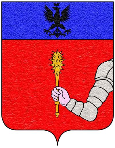 Stemma della Famiglia con Blasone, colori e partizioni